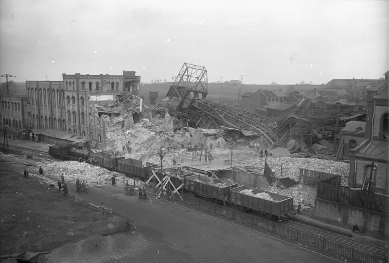 Die furchtbare Grubenkatastrophe in Alsdorf b. Aachen! Ueberblick über das riesige Trümmerfeld der grossen Bergwerks-Katastrophe in Alsdorf b. Aachen.